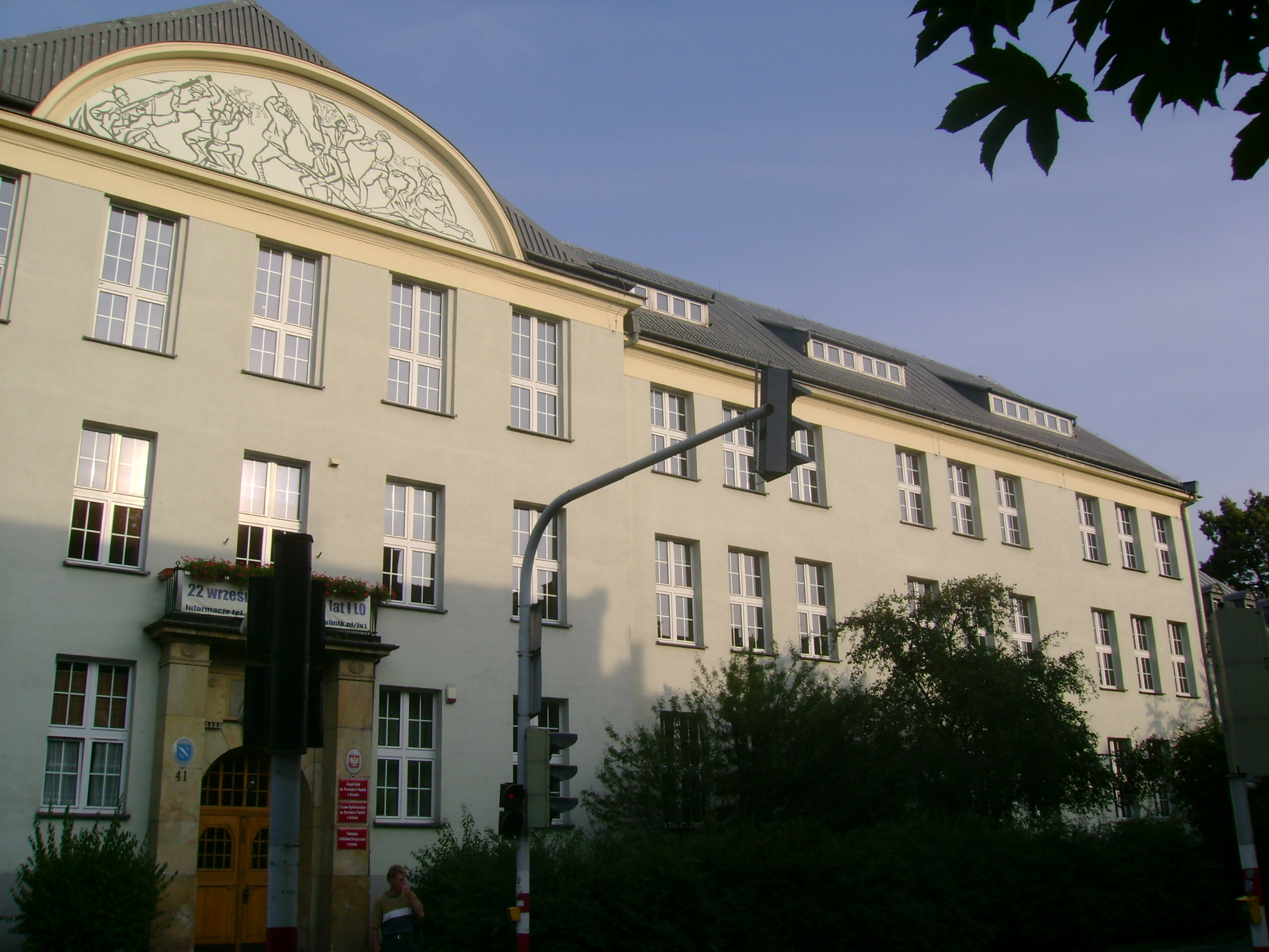 I LO Rybnik im. Powstańców Śląskich